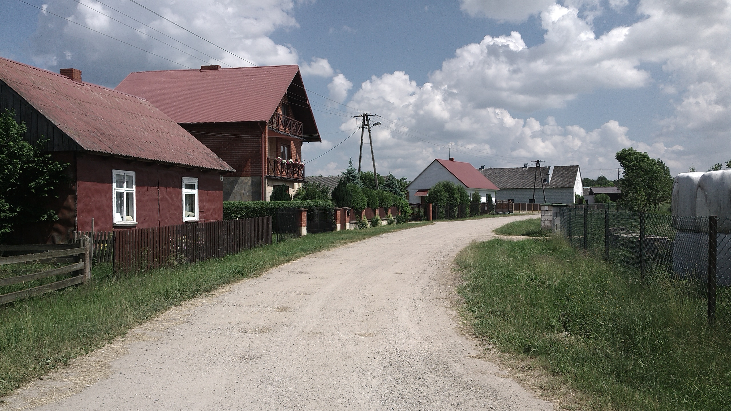 Słomiana (województwo świętokrzyskie) - zabudowania